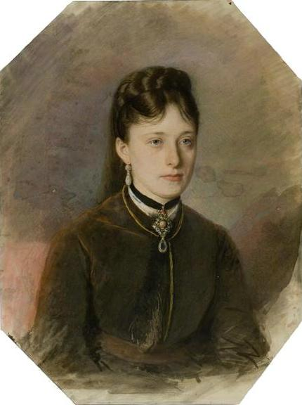 Портрет графини Александры Алексеевны Бобринской, ур. Писаревой (1843—1905)